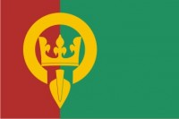 Radětice (okres Příbram)